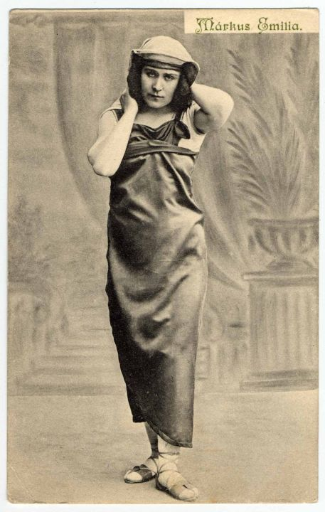 Madách Imre: Az ember tragédiája. Társulat: Nemzeti Színház, Budapest. Bemutató: 1883.09.21. Rendező: Paulay Ede. Szereplők: Éva (A rabszolga neje - Egyiptomi szín): Márkus Emília. Felvétel ideje: 1897